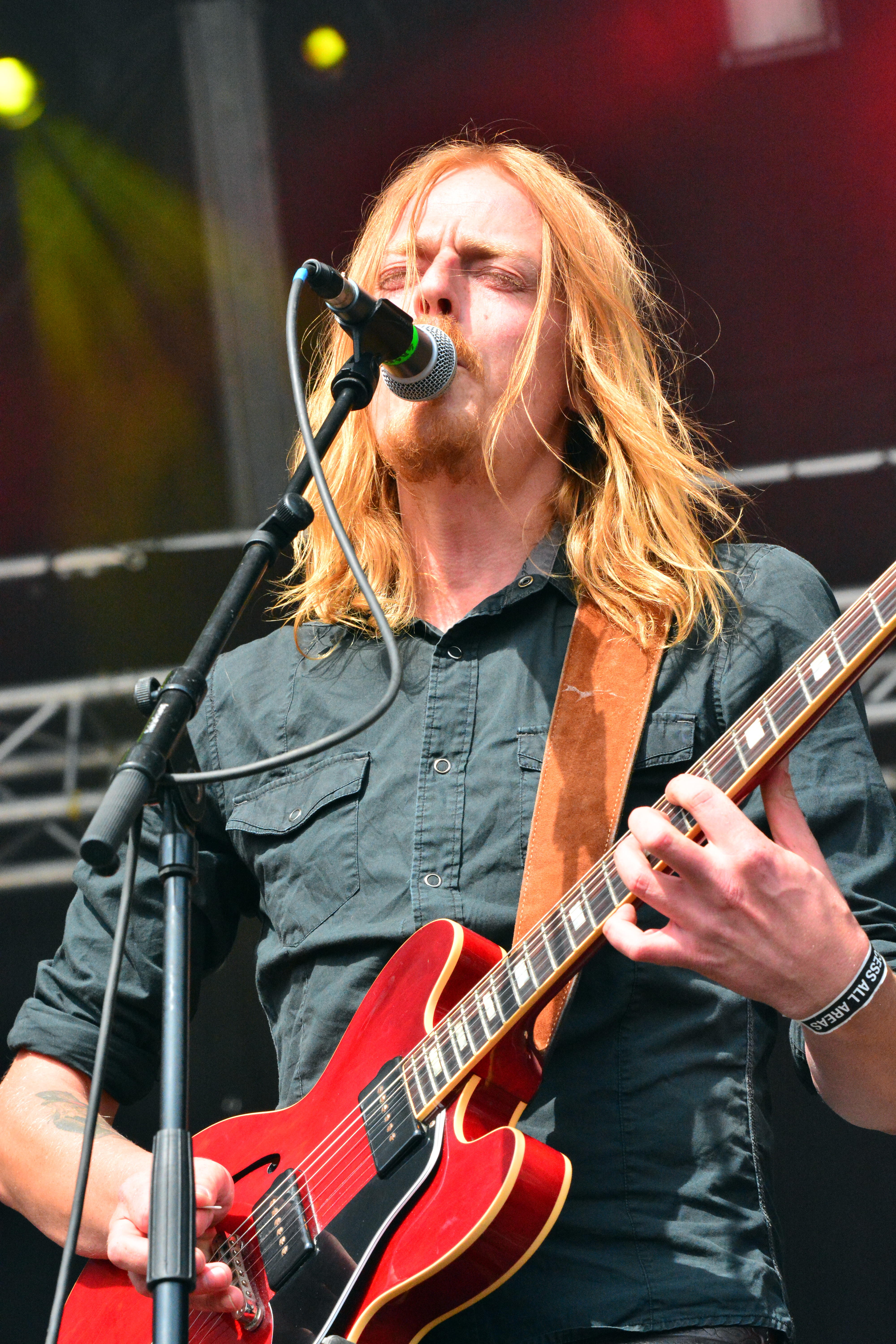 Joakim Nilsson von Graveyard beim Elbriot 2014